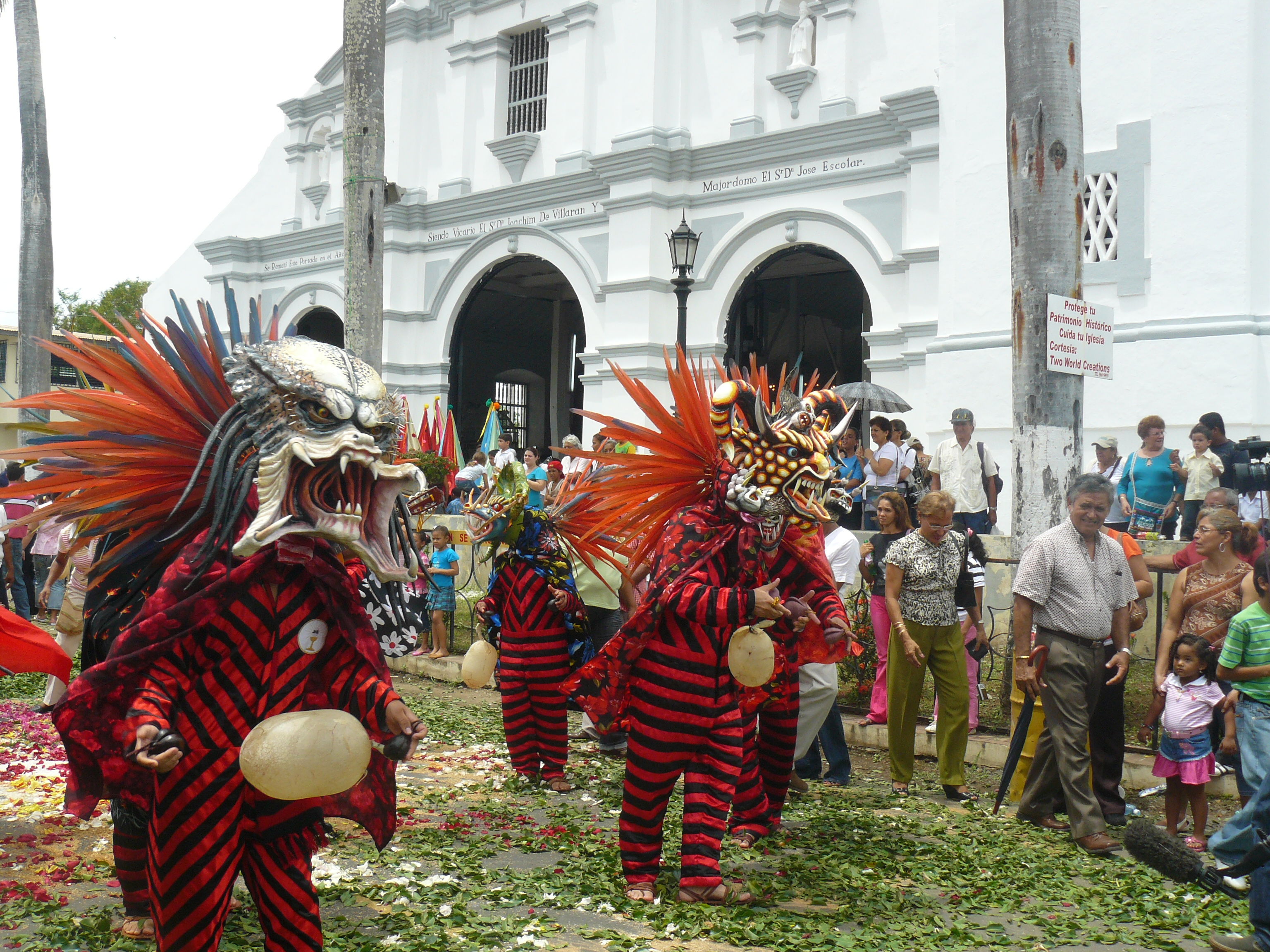 Diablicos Sucios ante la Iglesia San Atanasio de la Villa de los Santos.